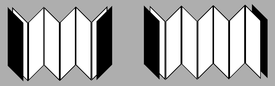 Иллюстрация метода складывания месоамериканских кодексов